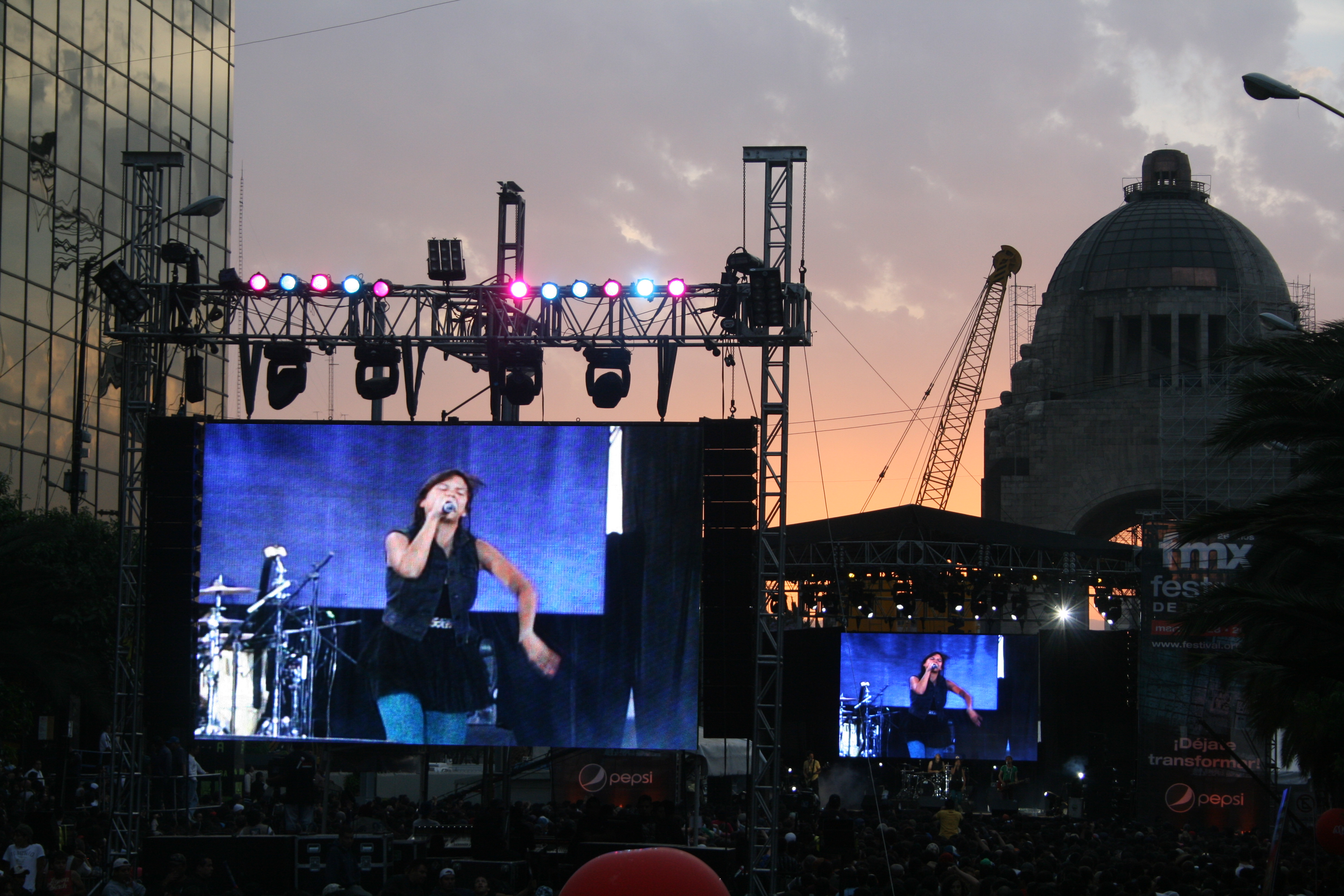 Bomba Estéreo en el Festival de la Ciudad de México de 2010